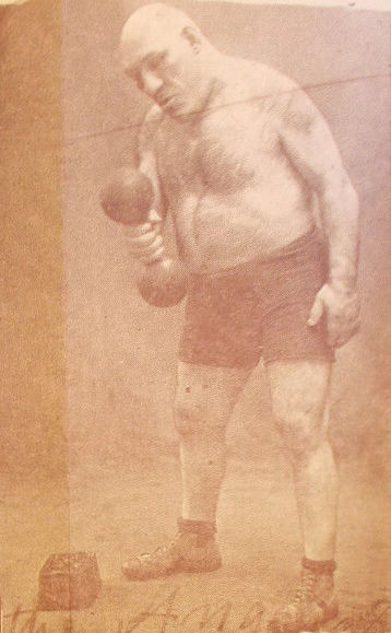 Maurice "The Angel" Tillet en page 6 du journal de catch Wrestling News Pictural Pulse du 9 janvier 1947.